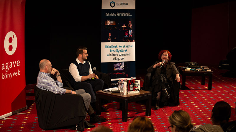 Doszpot Péter és Miklós Ágnes Kata a krimi evolúciójáról